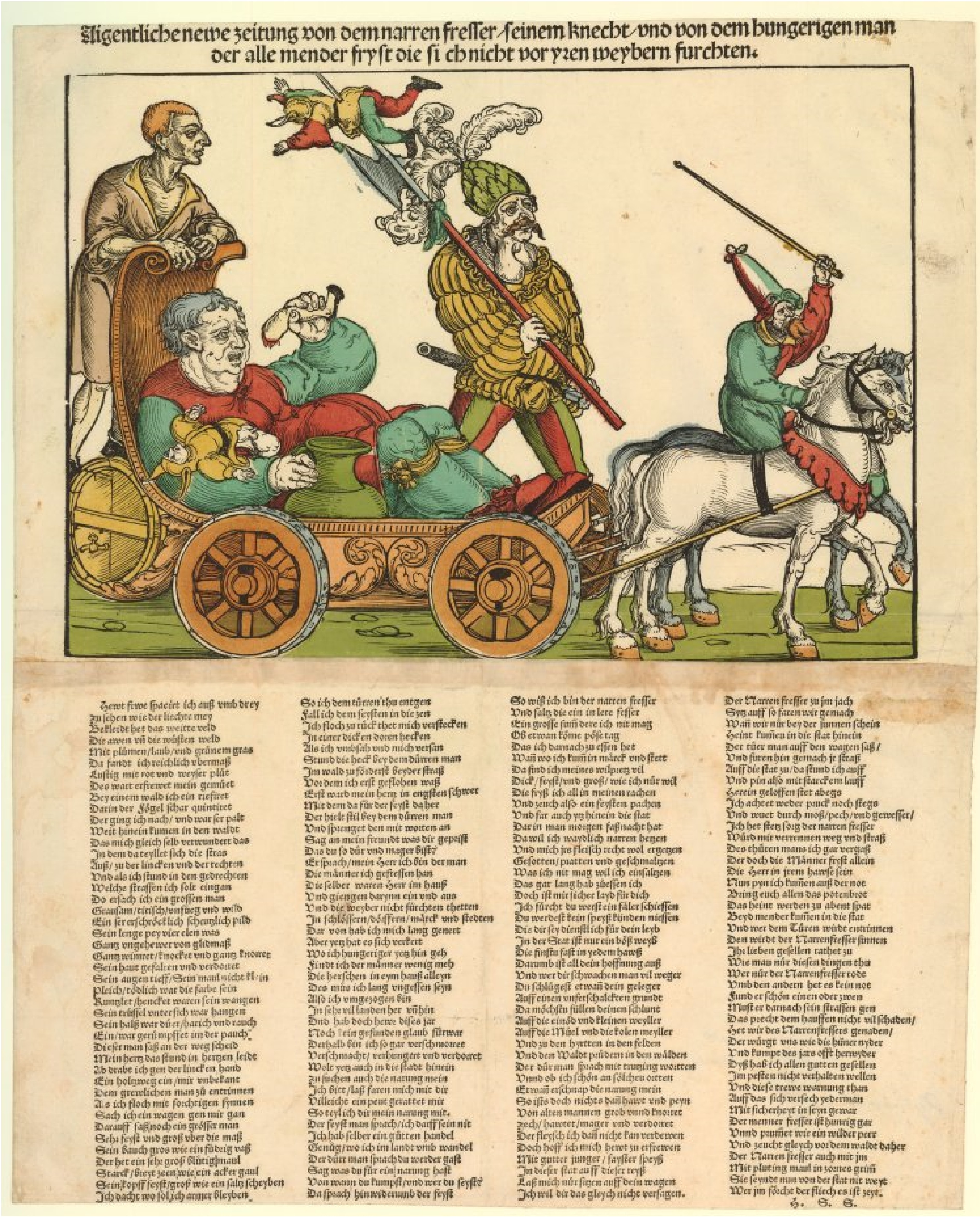 Aigentliche newe zeitung von dem narren fresser